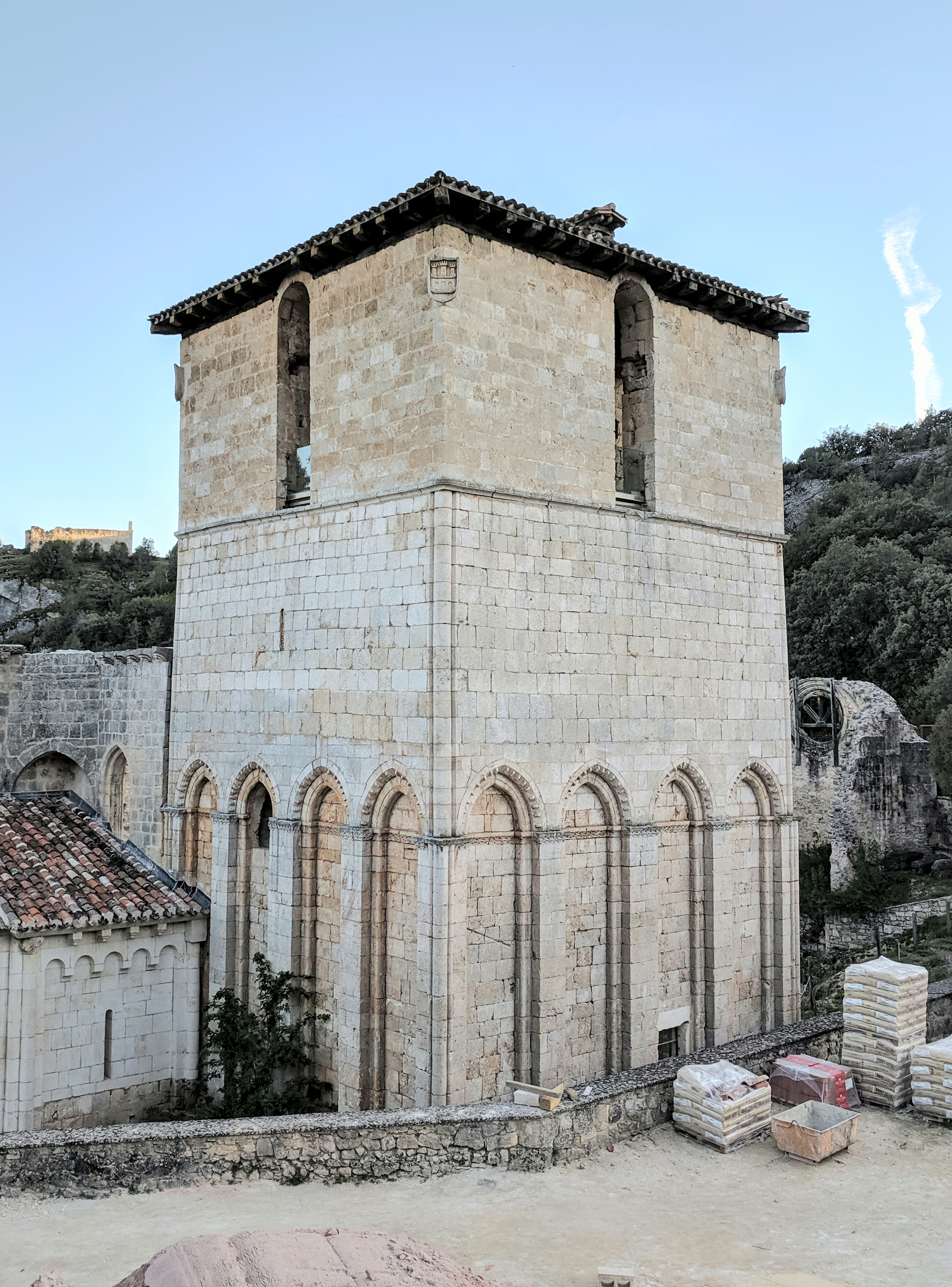 El monasterio de San Pedro de Arlanza (Hortigüela, Burgos) durante las obras de 2019.